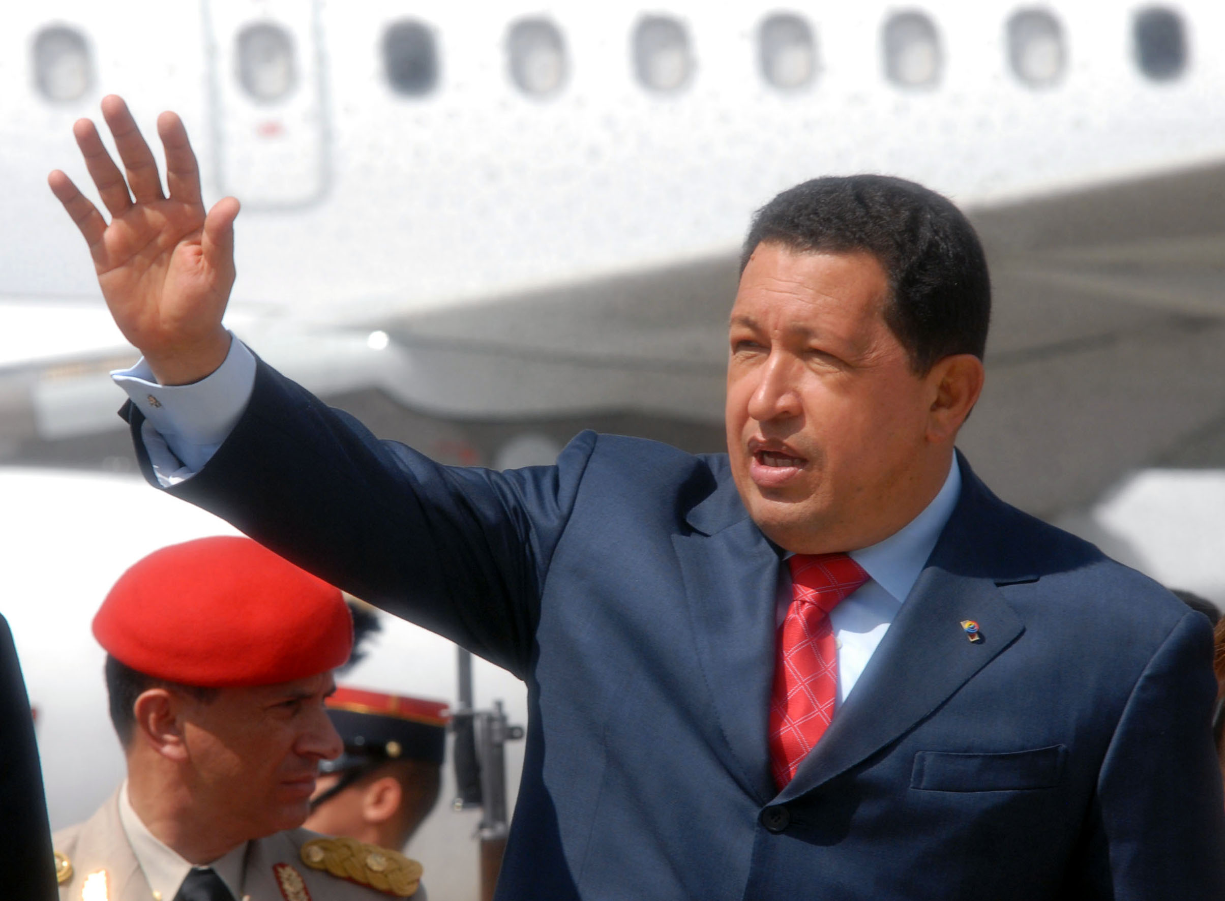 Hugo Chávez. Está imagen la subo para que no haya errores en Wikinoticias por la política de archivado.